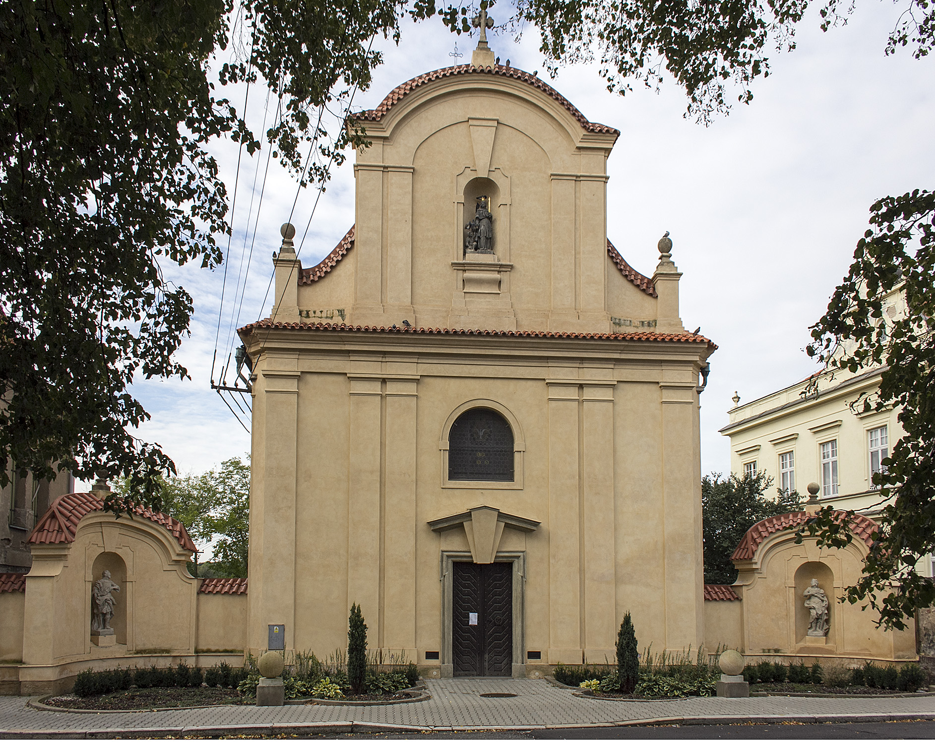 Kostel sv. Alžběty (Čáslav), S část města, Čáslav